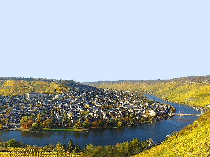 Bildbeschreibung: Bernkastel-Kues, Blick auf den Stadtteil Kues Quelle: eigenes Foto Fotograf/Zeichner: D0c Datum: 2005, Oktober Sonstiges: Die Lizenz gestattet die Vervielfältigung, Verbreitung und Veränderung des Werkes, auch zu kommerziellen Zwecken. Im Gegenzug verpflichtet sich der Lizenznehmer zur Einhaltung der Lizenzbedingungen. Diese sehen unter anderem die Pflicht zur Nennung des Autors bzw. der Autoren vor und verpflichten den Lizenznehmer dazu, abgeleitete Werke unter dieselbe Lizenz zu stellen (Copyleft-Prinzip).